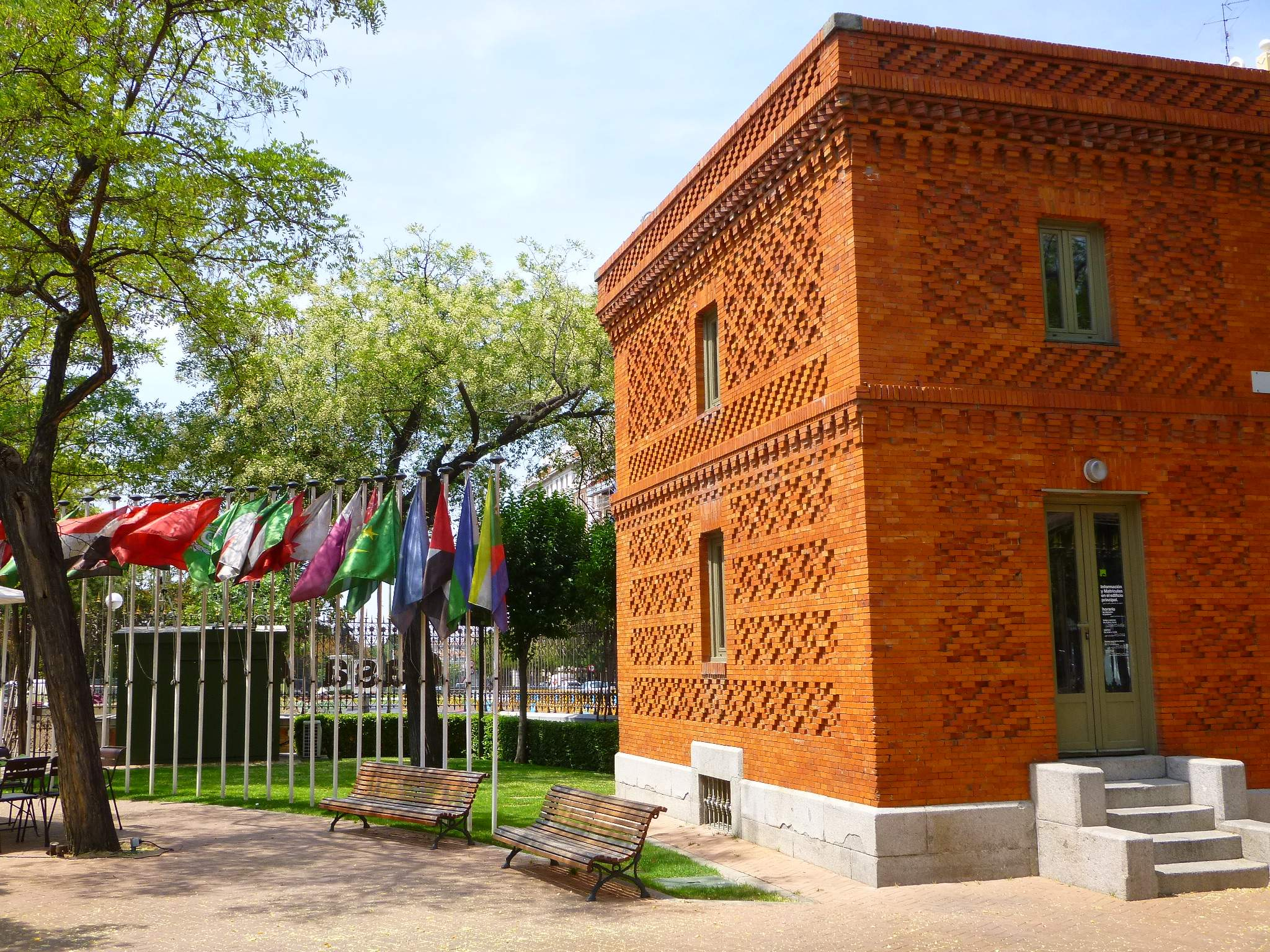 Casa Árabe e Instituto Internacional de Estudios Árabes y del Mundo Musulmán (Madrid)